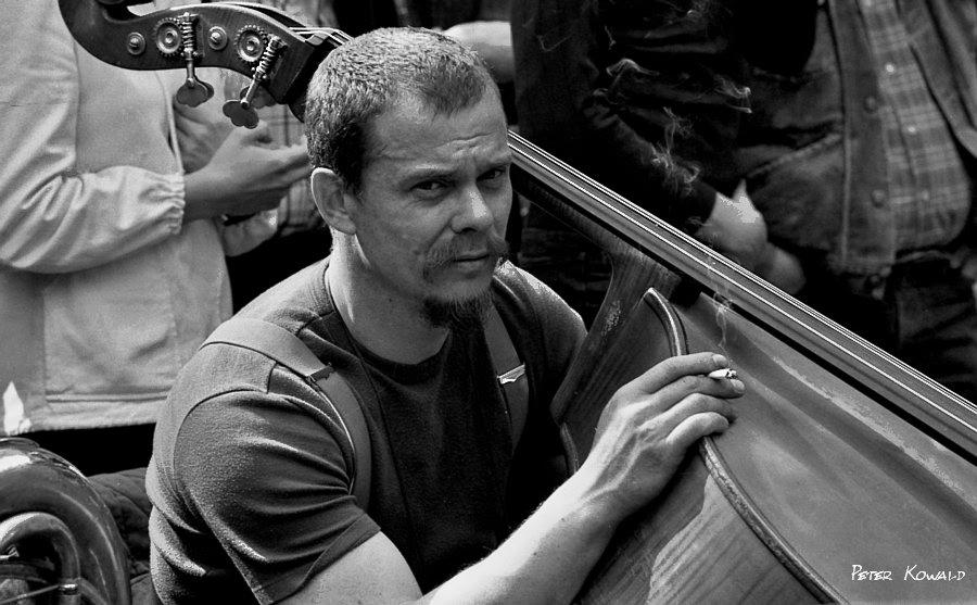 Peter Kowald, Globe Unity Ochestra, Open Air Konzert in Wuppertal (Laurentiusplatz), 1970-er Jahre